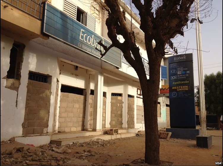 EcoBank, ou ce qu’il en reste.